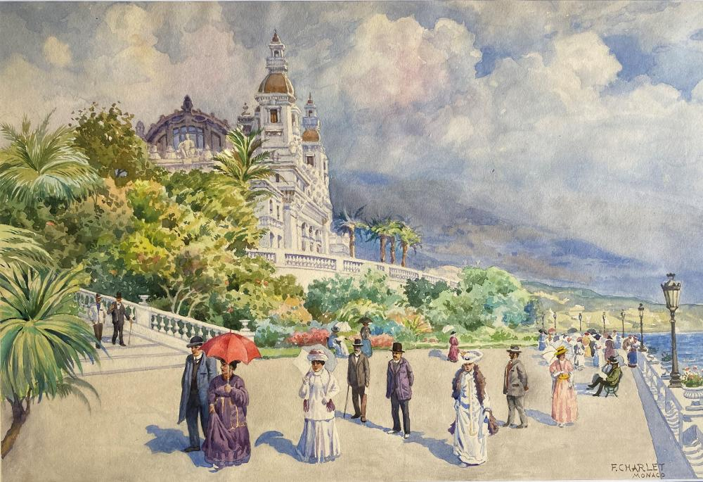 Monaco, la promenade devant le Palais Garnier